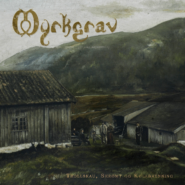 Cover artwork of Myrkgrav's "Trollskau, Skrømt og Kølabrenning"